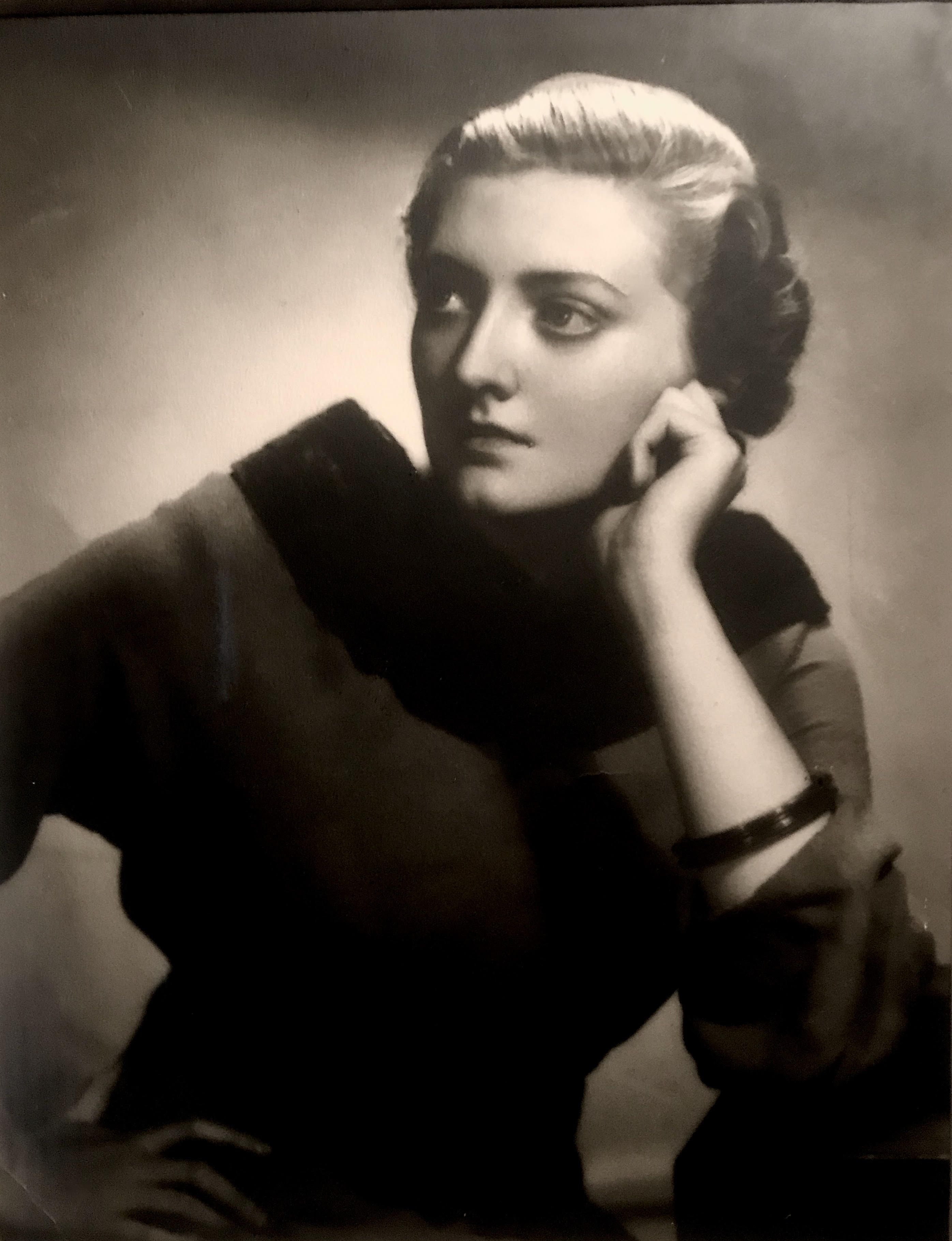 Elena Larrain, líder independiente